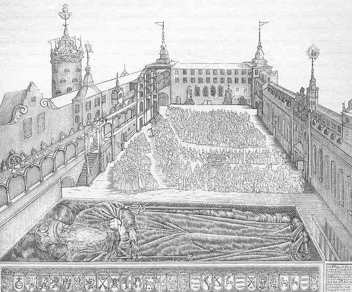 Johan III:s bisättning i Stockholm.